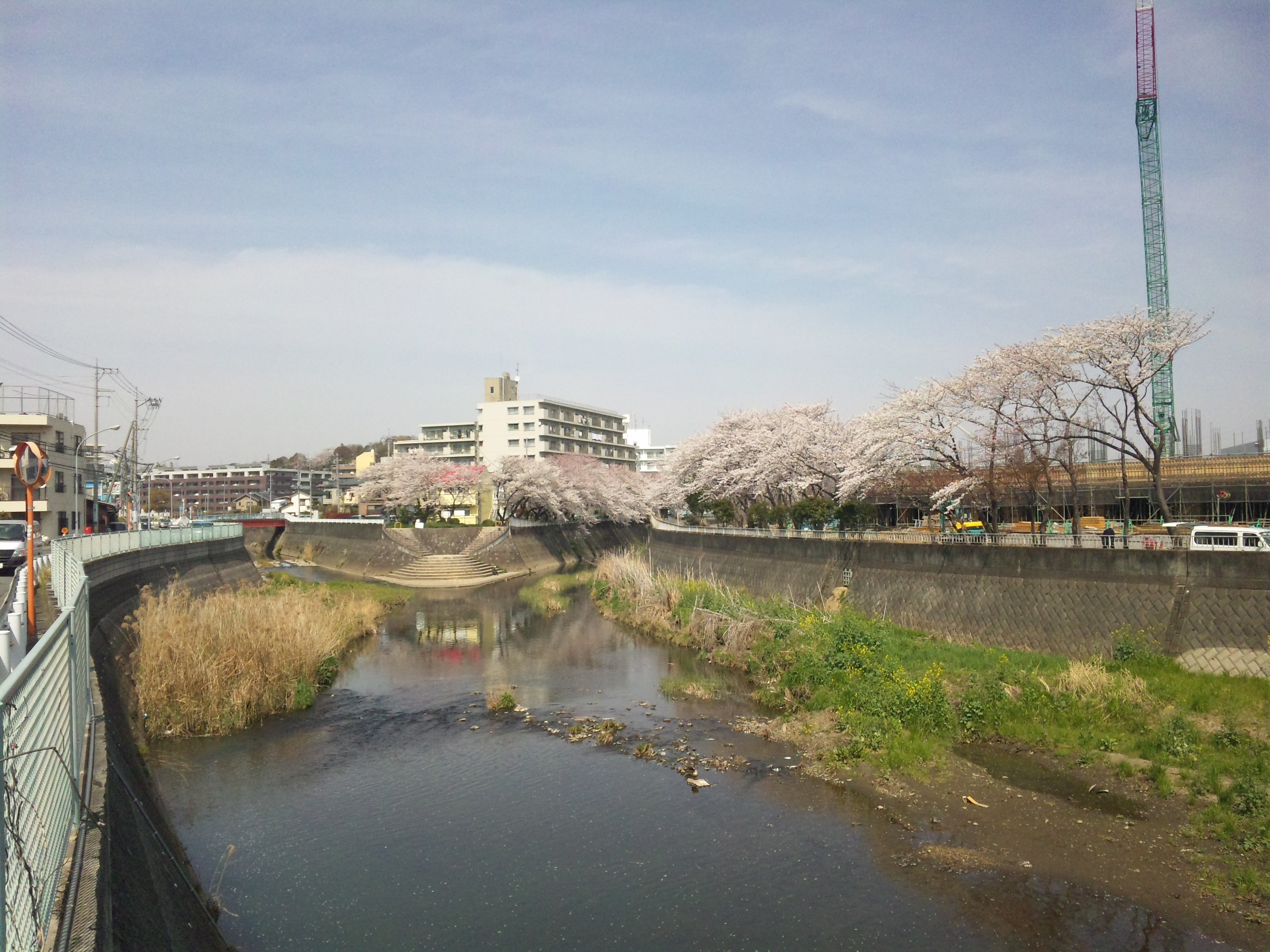 平戸永谷川（左）、阿久和川合流地点 NTTドコモ SH-01Bにて撮影